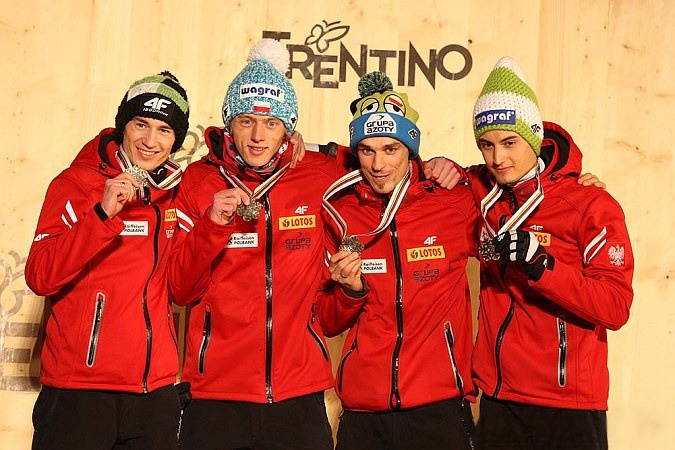 Dekoracja medalowa konkursu drużynowego mężczyzn na skoczni K-120